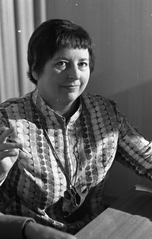 Signierung des Buches "Grob, fein und göttlich" durch die Autoren HAP [Helmut Andreas Paul Grieshaber] und Frau [Margarete] Hannsmann in der Landesvertretung Baden-Württemberg